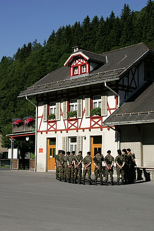 Ehemaliger Bahnhof von Elm